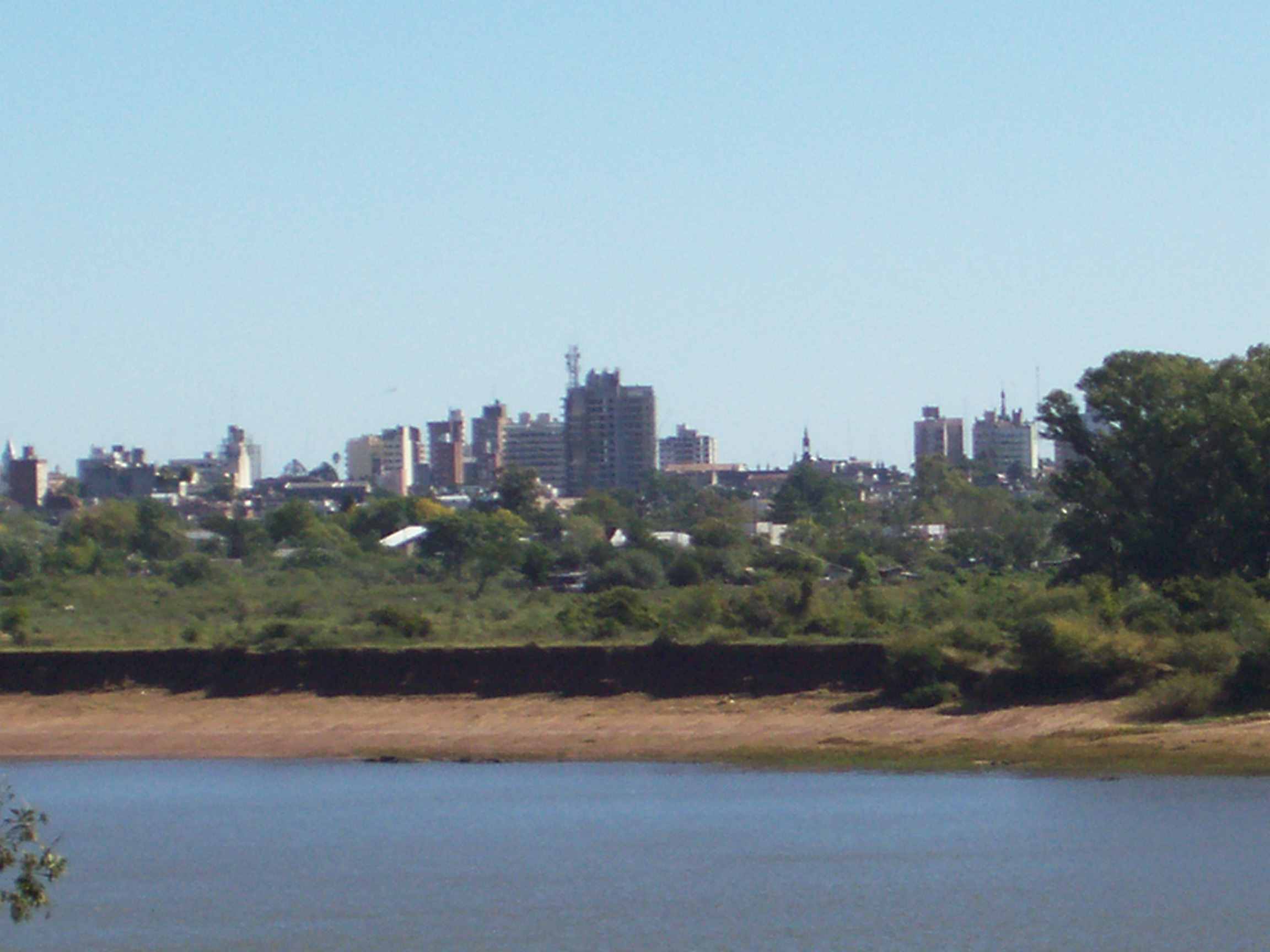 Ciudad de Concordia, vista desde la orilla uruguaya del Río Uruguay. Fotografía tomada por Federico Corral aka Shant